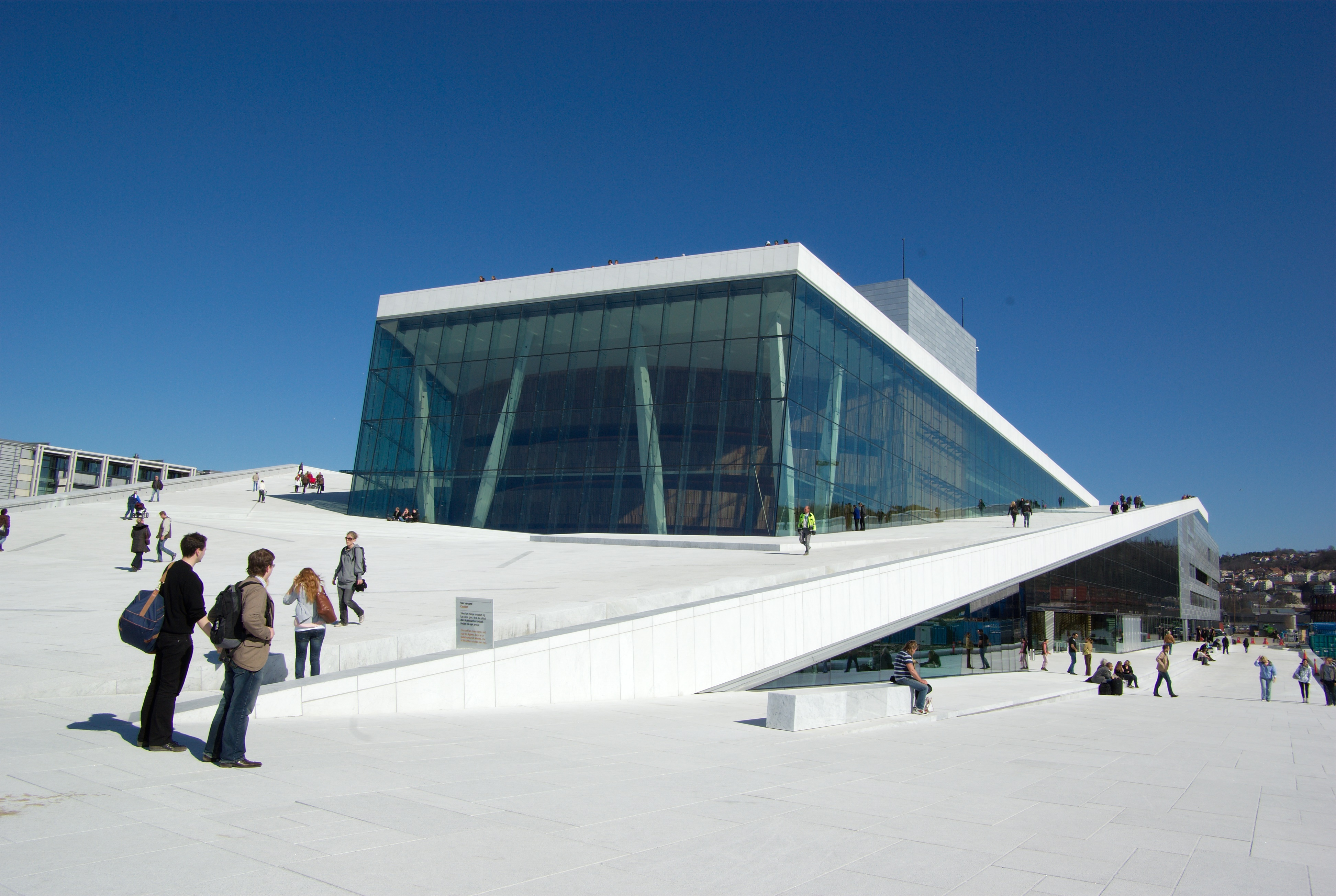 Oslo Opera House Bjørvika, Oslo, Norway, April 2008 © 2005, 2006, 2007 by Bjørn Erik Pedersen Licensing:[edit]